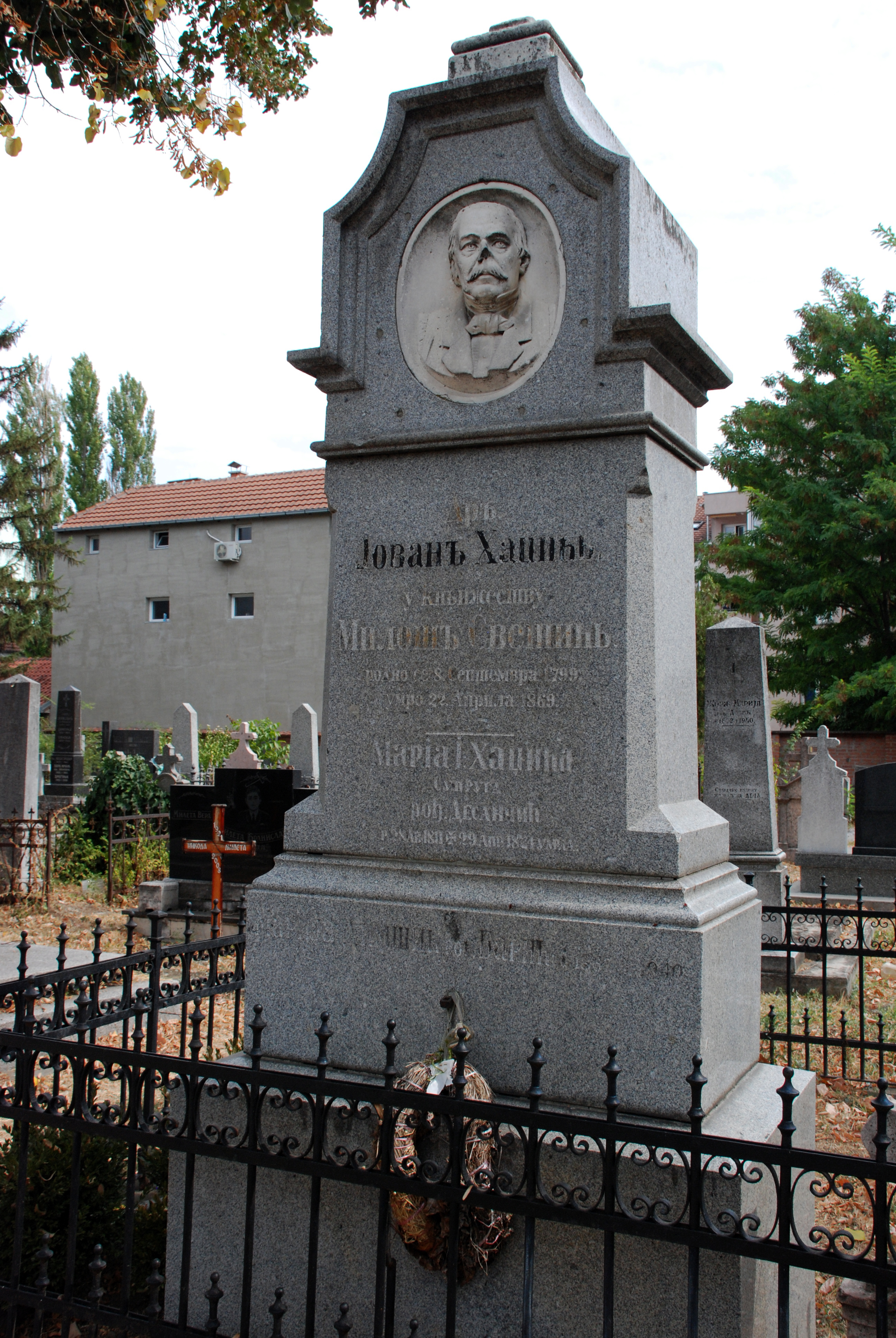 Милош Светић 1799-1869, један од оснивача Матице српске и њен први председник, песник, писац историјских и филолошких расправа, преводилац, адвокат, уређивао часопис Огледало српско, радио на изради Устава Србије, водио полемику са Вуком око језика